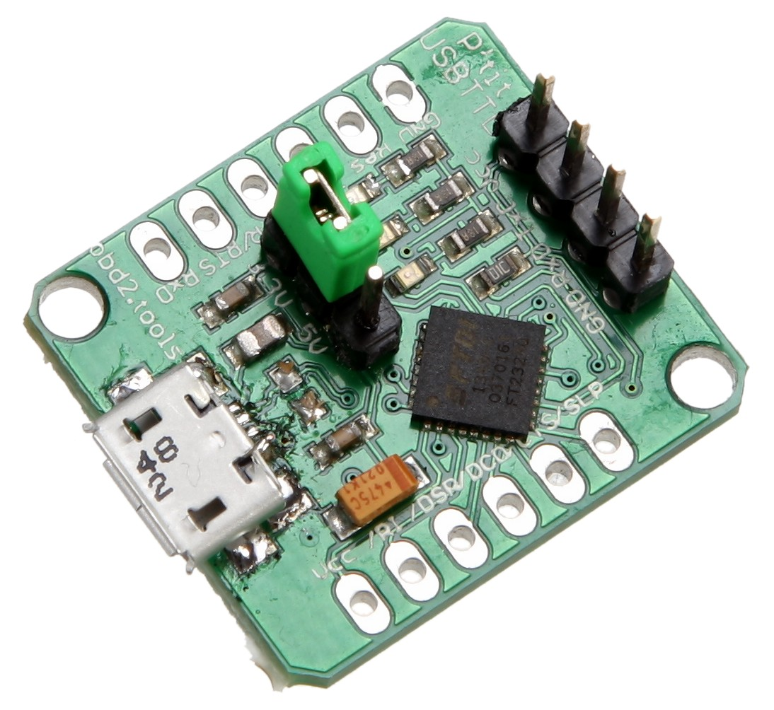 P'tit USBTTL (24,13 x 21,59 mm) FTDI USB zu TTL UART Adapter